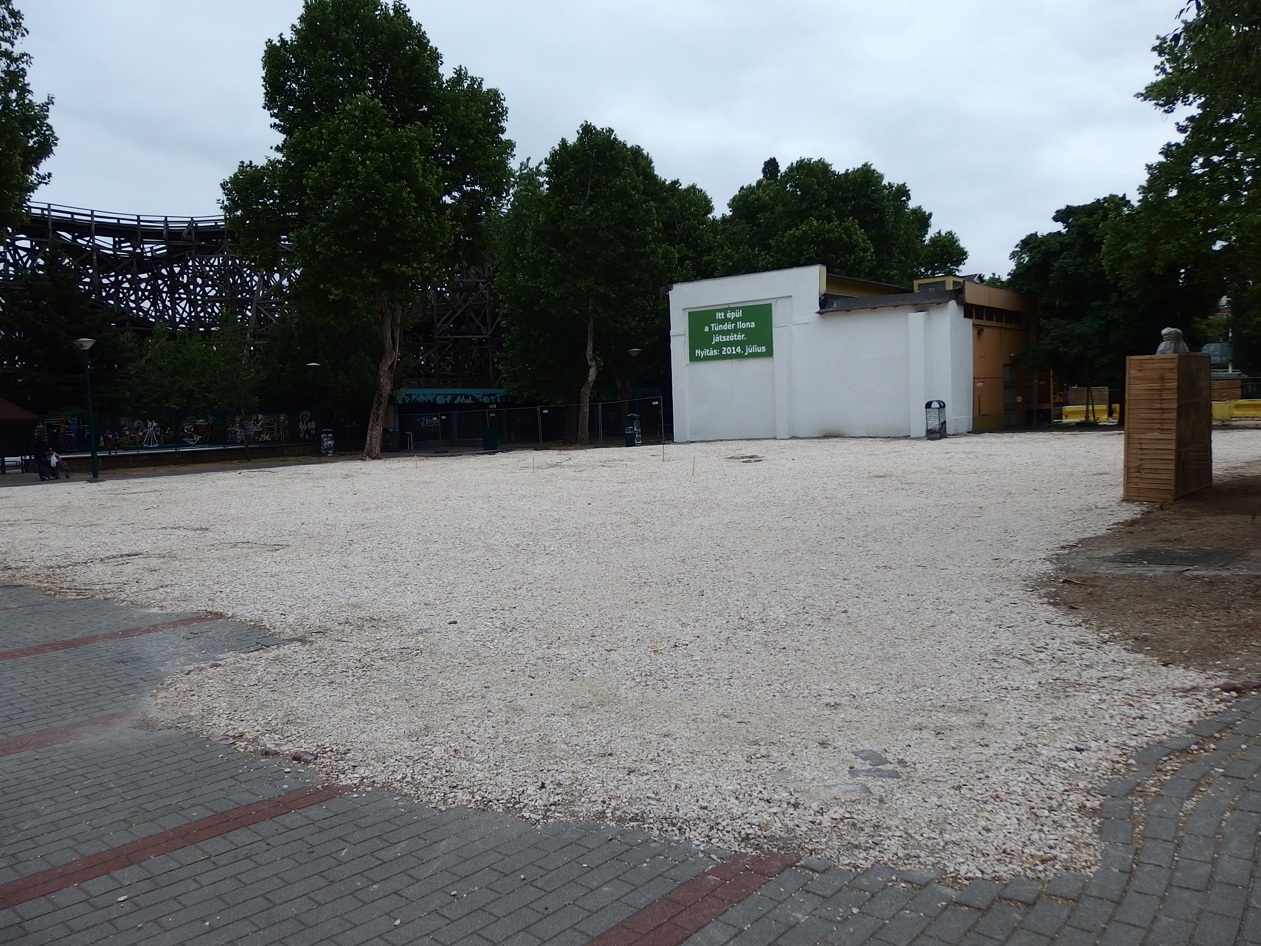 A Viharvasút helye 2014-ben (egykori budapesti vidámpark)